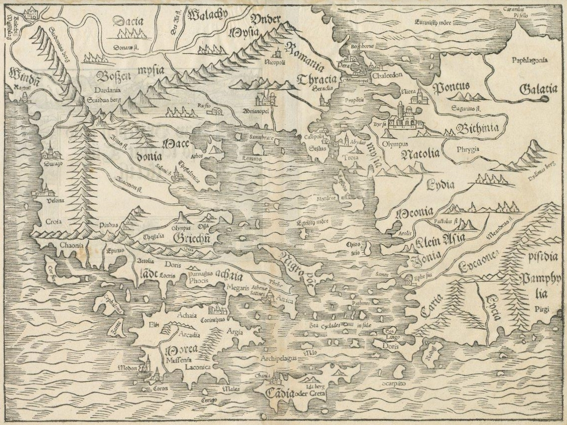 „New Griechenlandt mit andern anstossenden Ländern wie es zu unsern Zeiten beschriben ist.“ Karte des Kartografen Sebastian Münster aus Cartes extraites de la Cosmographie de Münster. Herausgegeben von Heinrich Petri 1550, Bibliothèque nationale de France, département Cartes et plans, GE DD-2000 (RES)